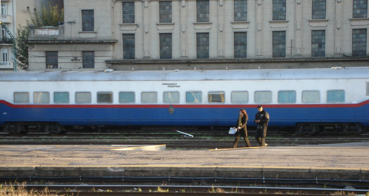 Coche presidencial en Retiro, pintado con colores y logotipo de la extinta Ferrocarriles Argentinos.